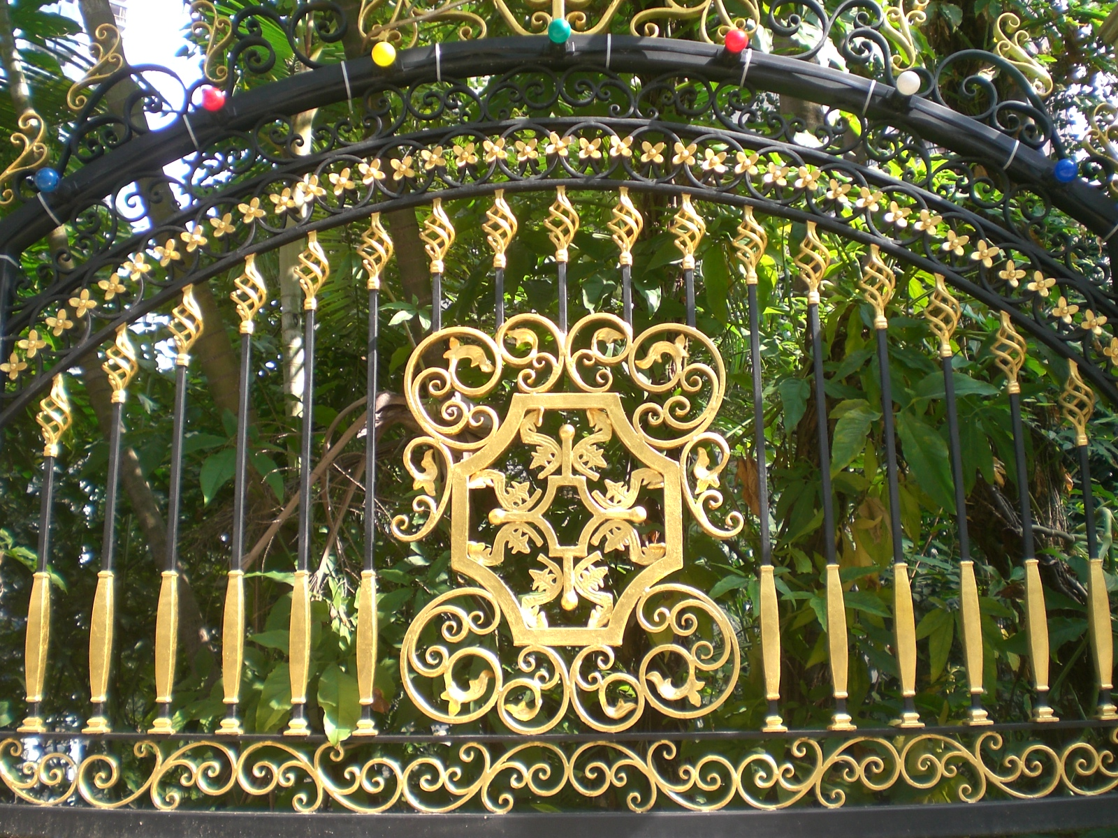 馬己仙峽道近花園道55號愛都大廈